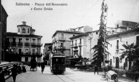 Sulmona - Piazza dell'Annunziata